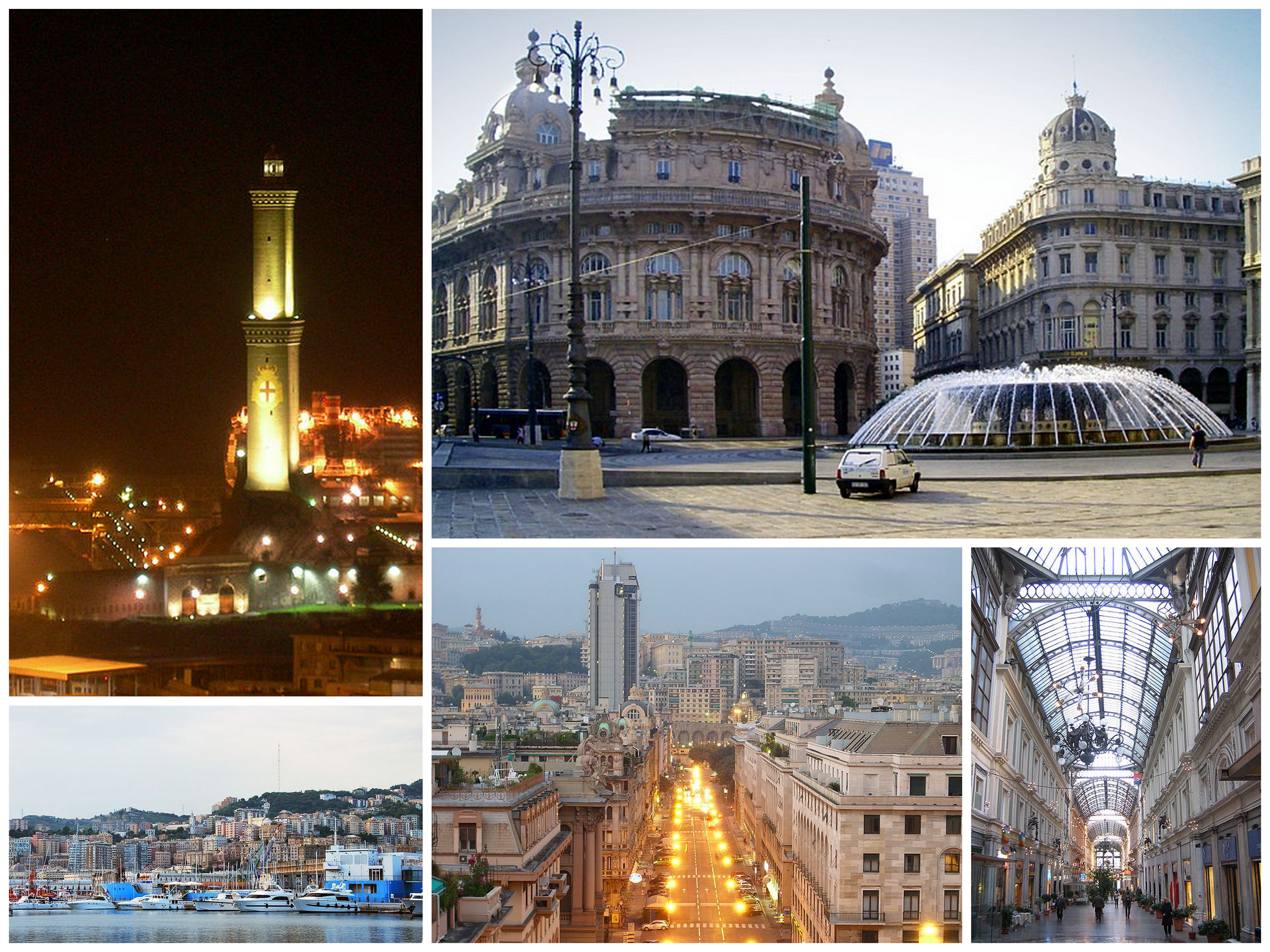 Collage di varie foto di Genova